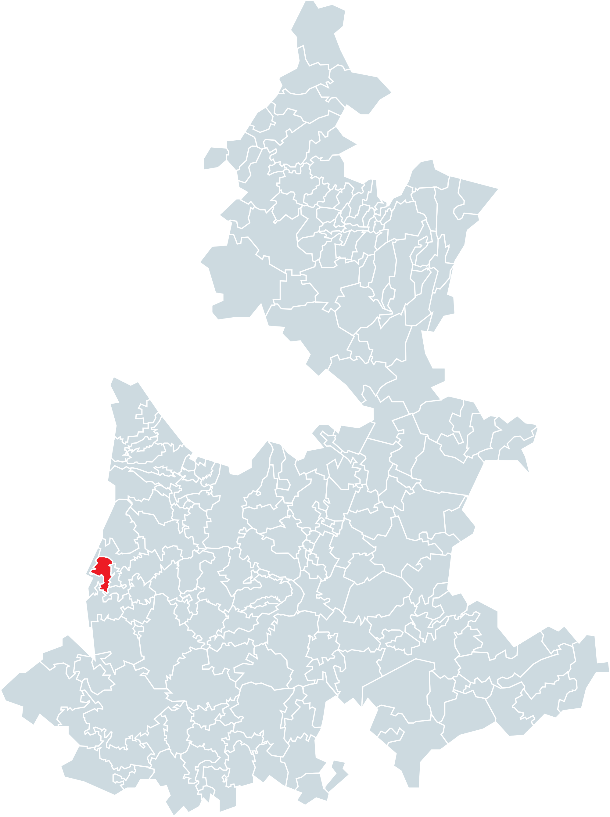 Municipio de Acteopan